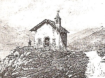 ancienne photo de la chapelle.